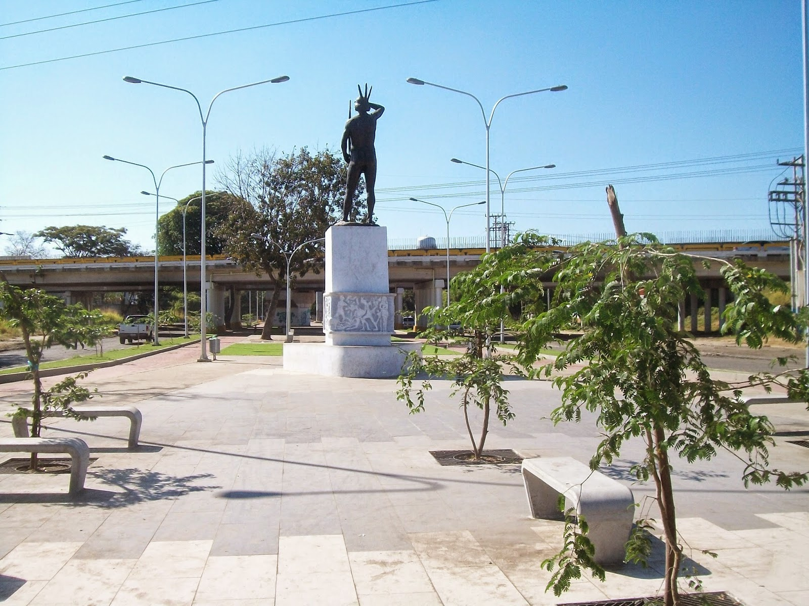 Sin descripción